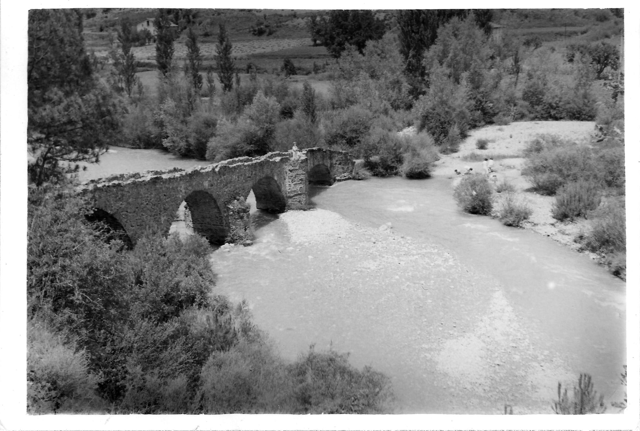 Pont medieval d'Ogern (Bassella): foto feta l'any 1964, poc abans de la seva destrucció parcial